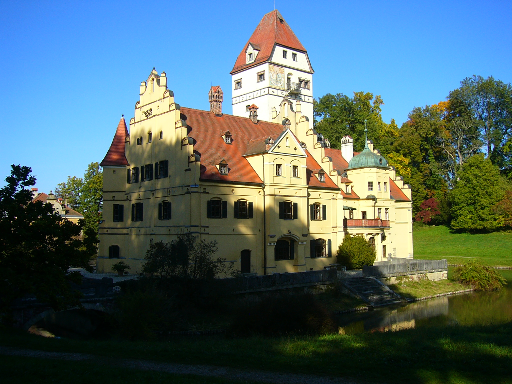 Schloss Schönau (Lkr. Rottal-Inn), Niederbayern - Außenansicht der Frontfassade.